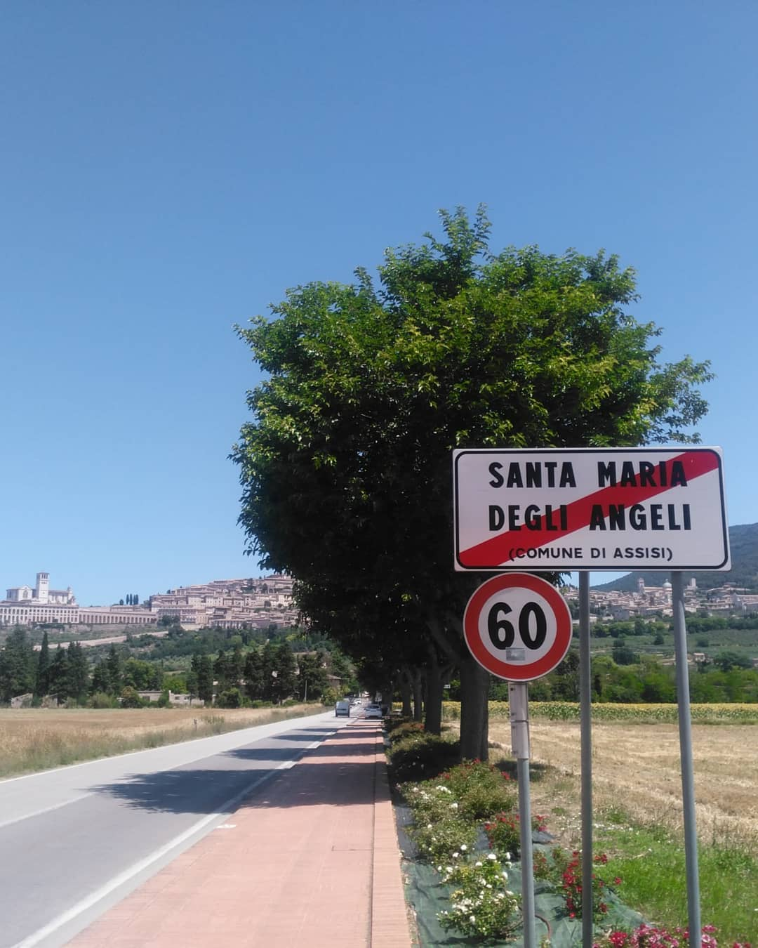 Srpskohrvatski / српскохрватски: Santa Maria degli Angeli na pešačkom putu prema Assisiju.